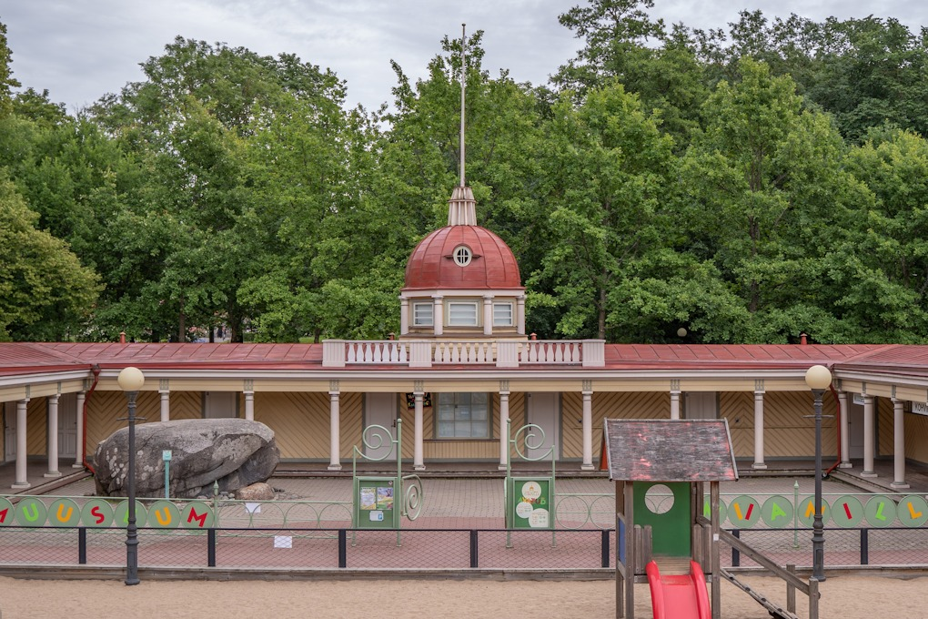 Lastemuuseum Miiamilla